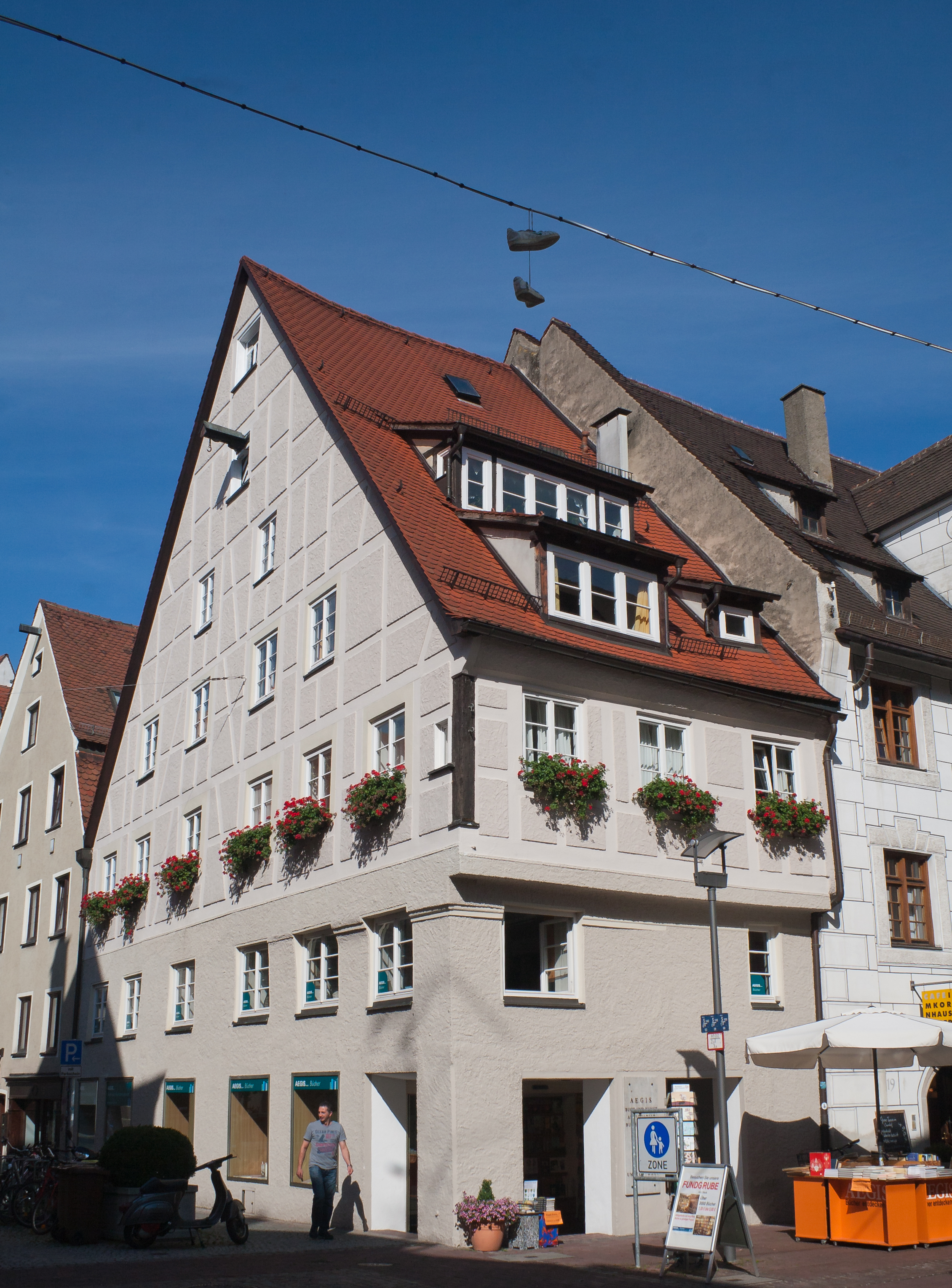 Ulm, Baden-Württemberg, Germany